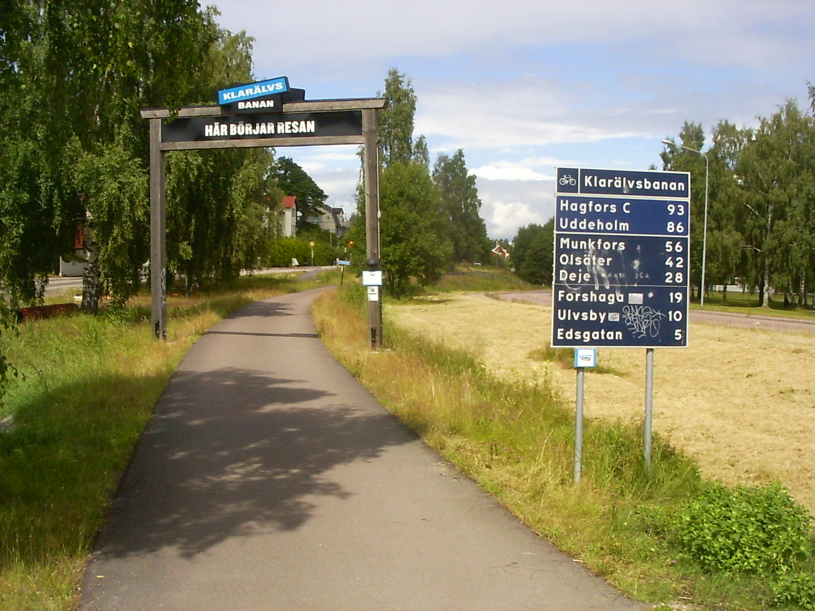 Karlstad, begin van de Klarälvsbanan